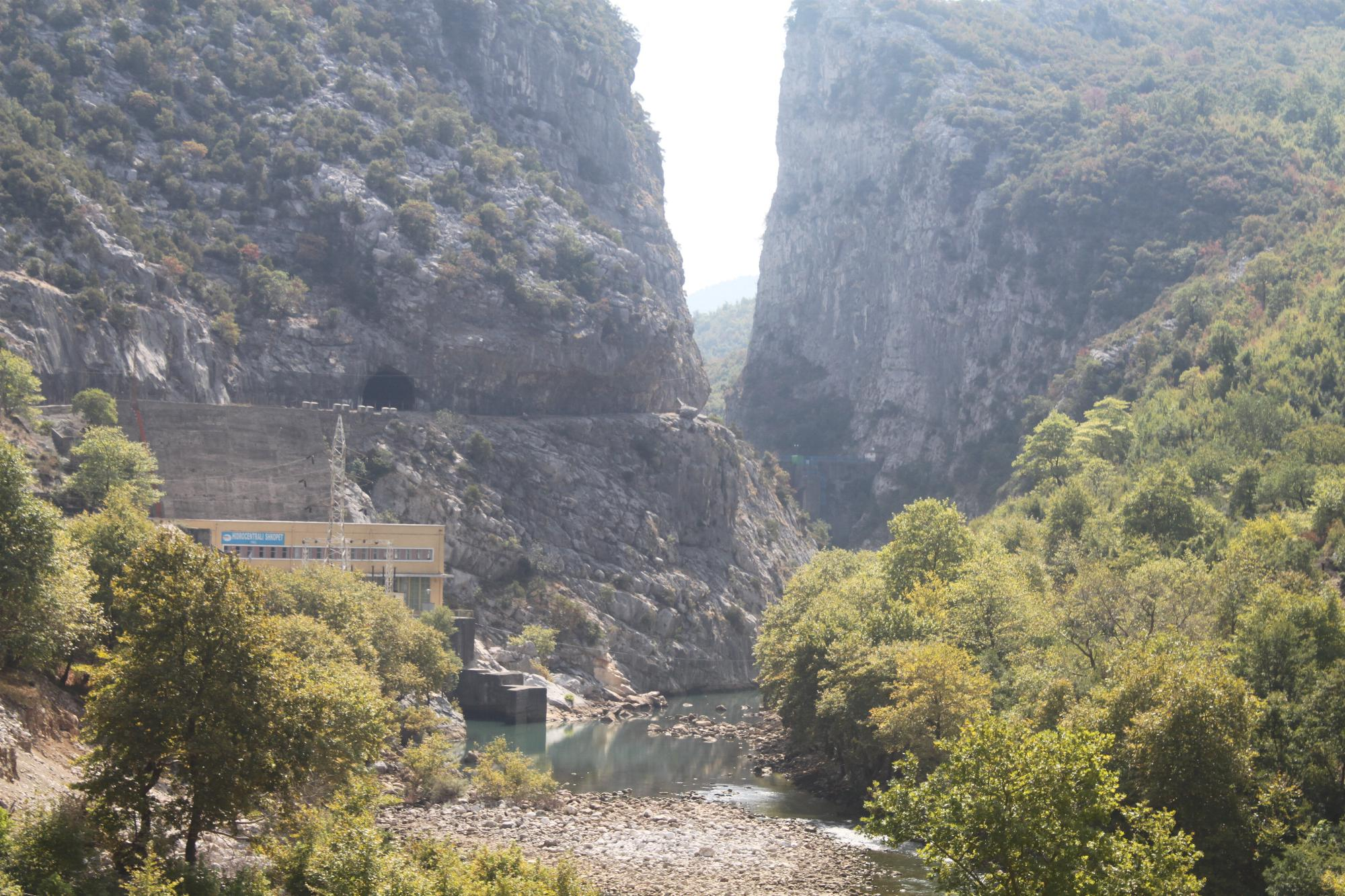 Wasserkraftwerk Shkopet. Links im Berg der Tunnel der Fernstraße SH6 sowie die alte Passstraße um den Berg herum.